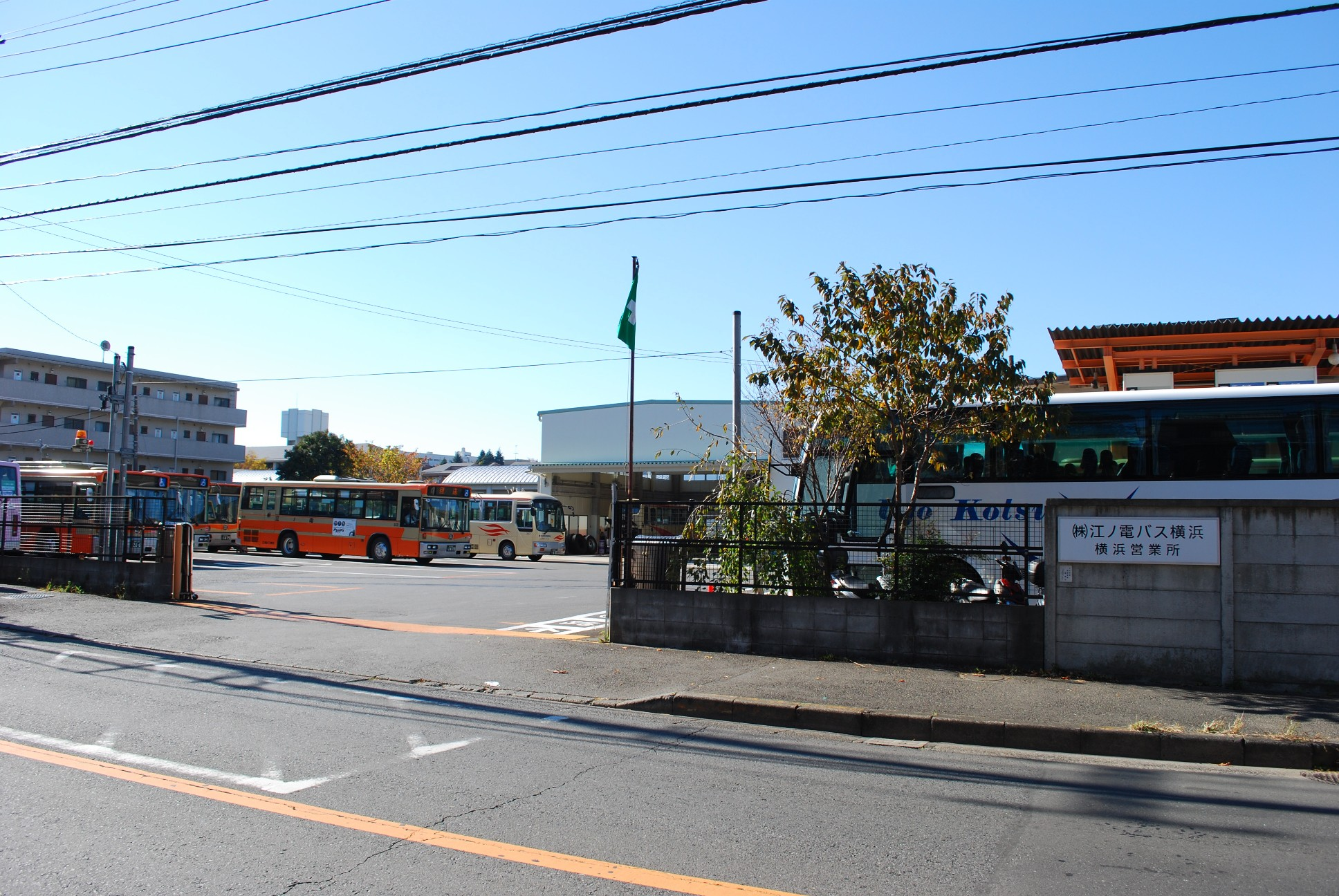 株式会社江ノ電バス横浜横浜営業所。敷地外の路上より撮影。共同運行している高速バス田沢湖線羽後交通の車両。